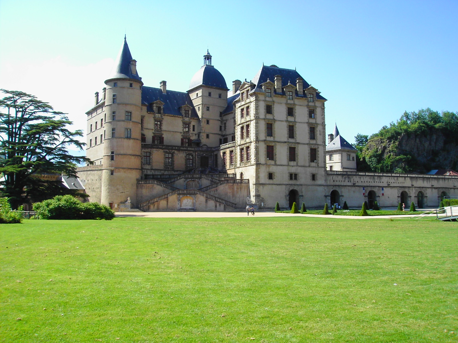 Château de Vizille, près de Grenoble, abritant le musée de la révolution Française.